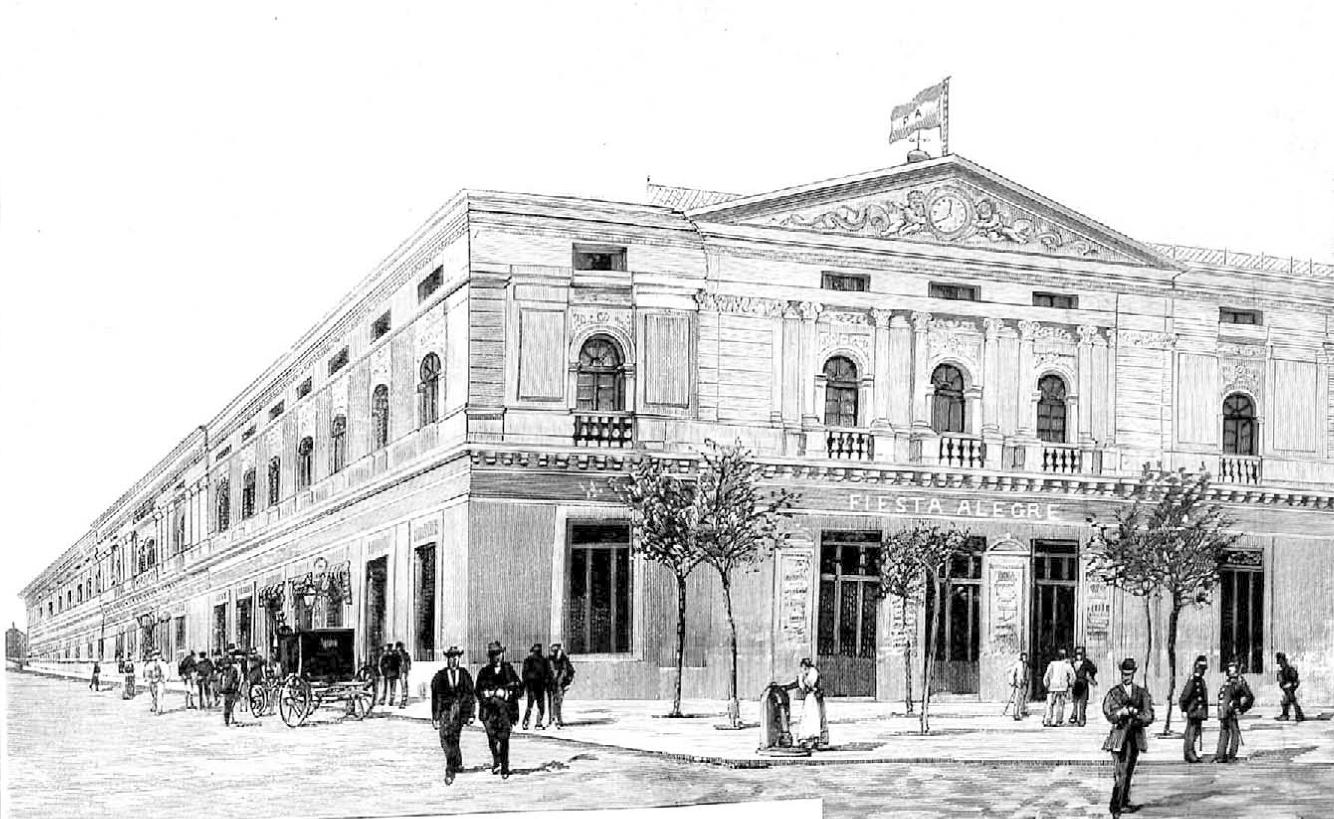 Madrid. Frontón Fiesta Alegre.